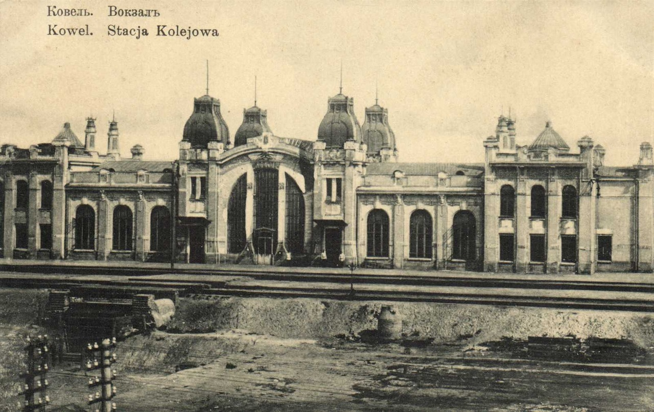 Залізничний вокзал Ковель, поч. 20 ст.